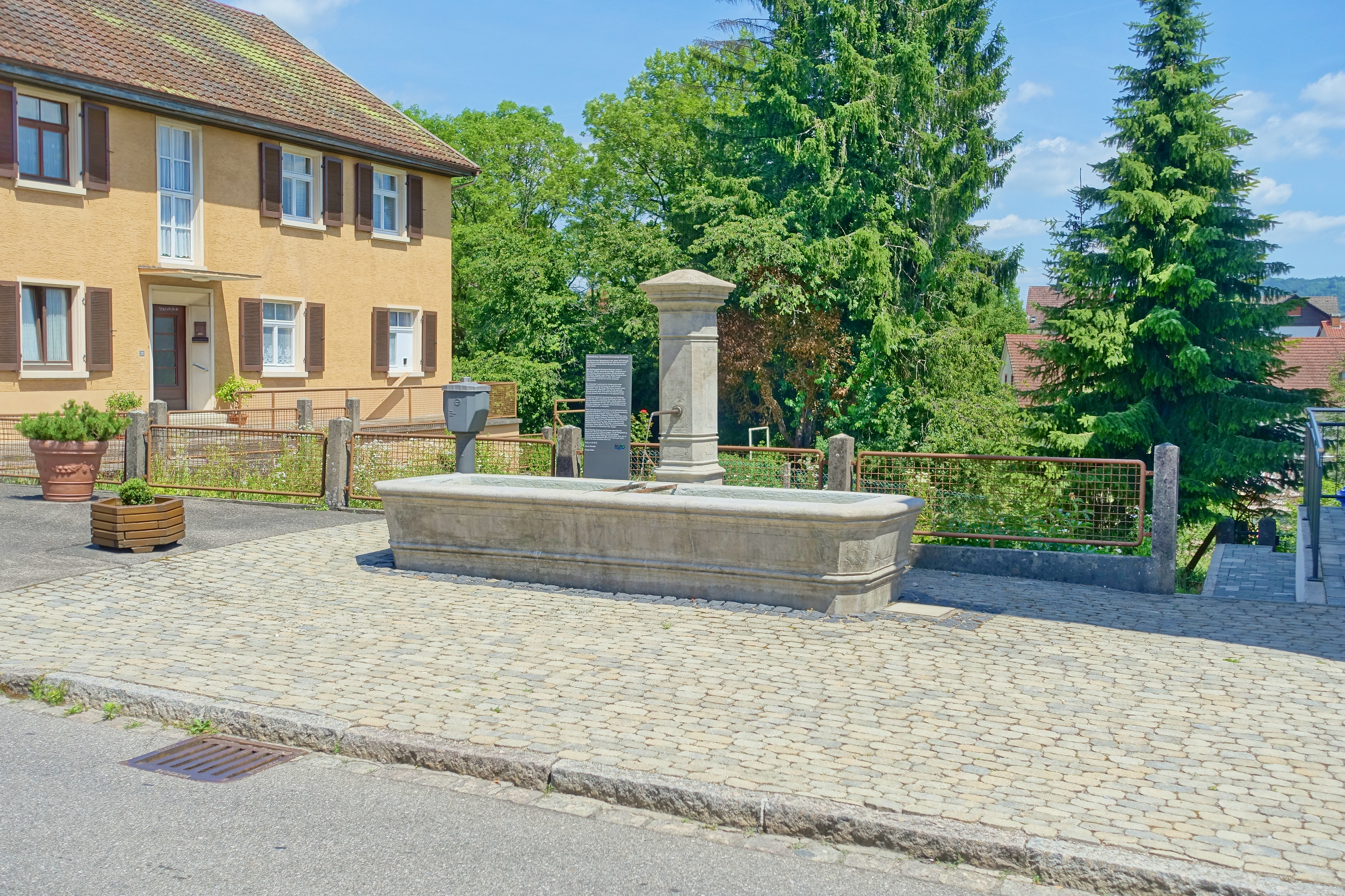 Baudenkmal Brunnenanlage Kirchstraße